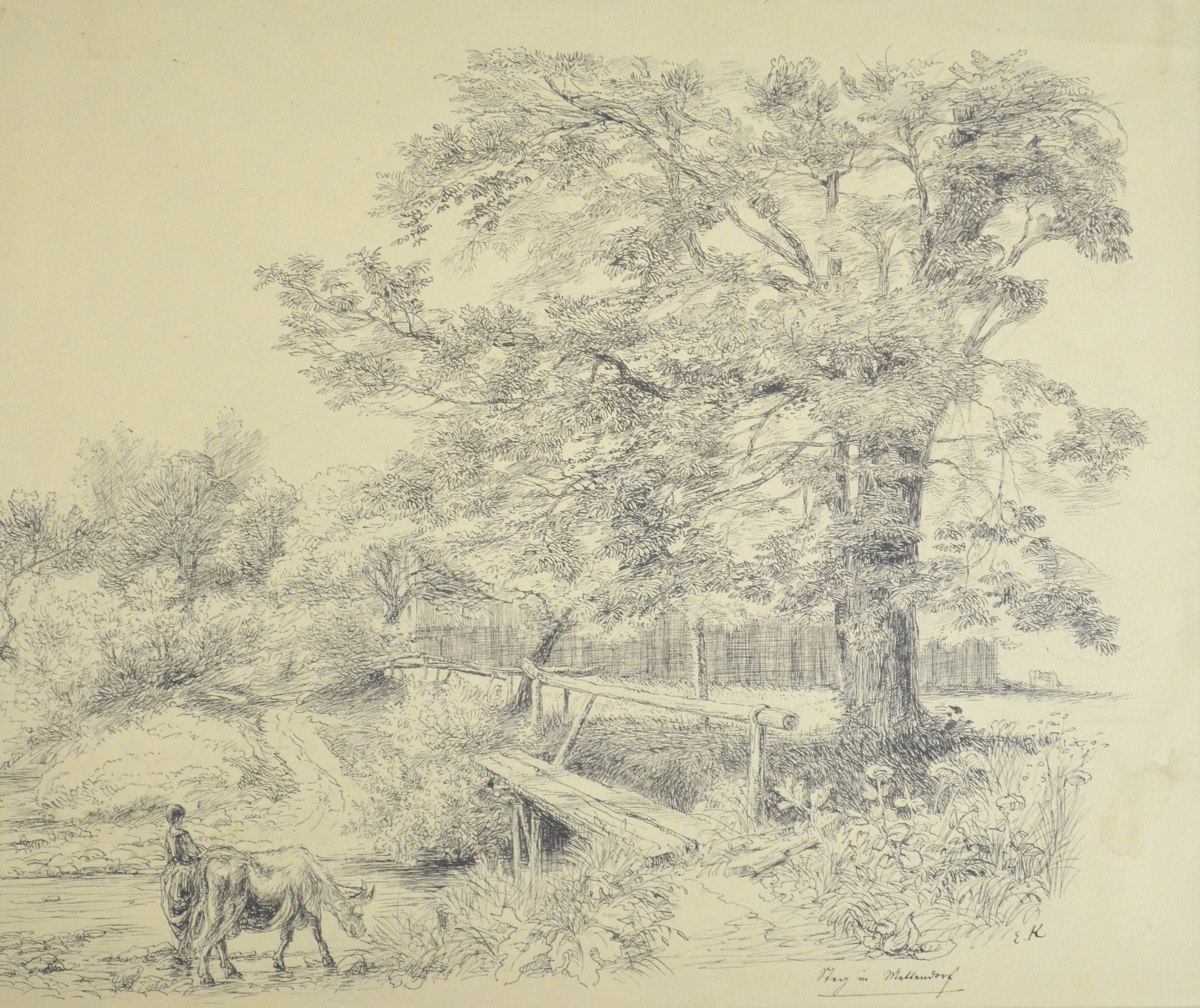 Tuschezeichnung Elisabeth Kelly (1825-1890)